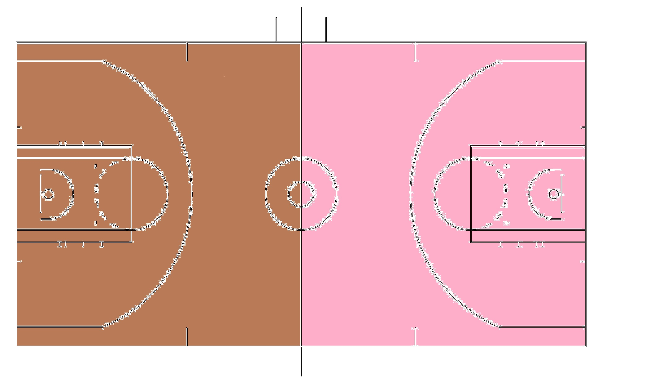 praca pochodna do File:NBA court dimensions 2008.pdf